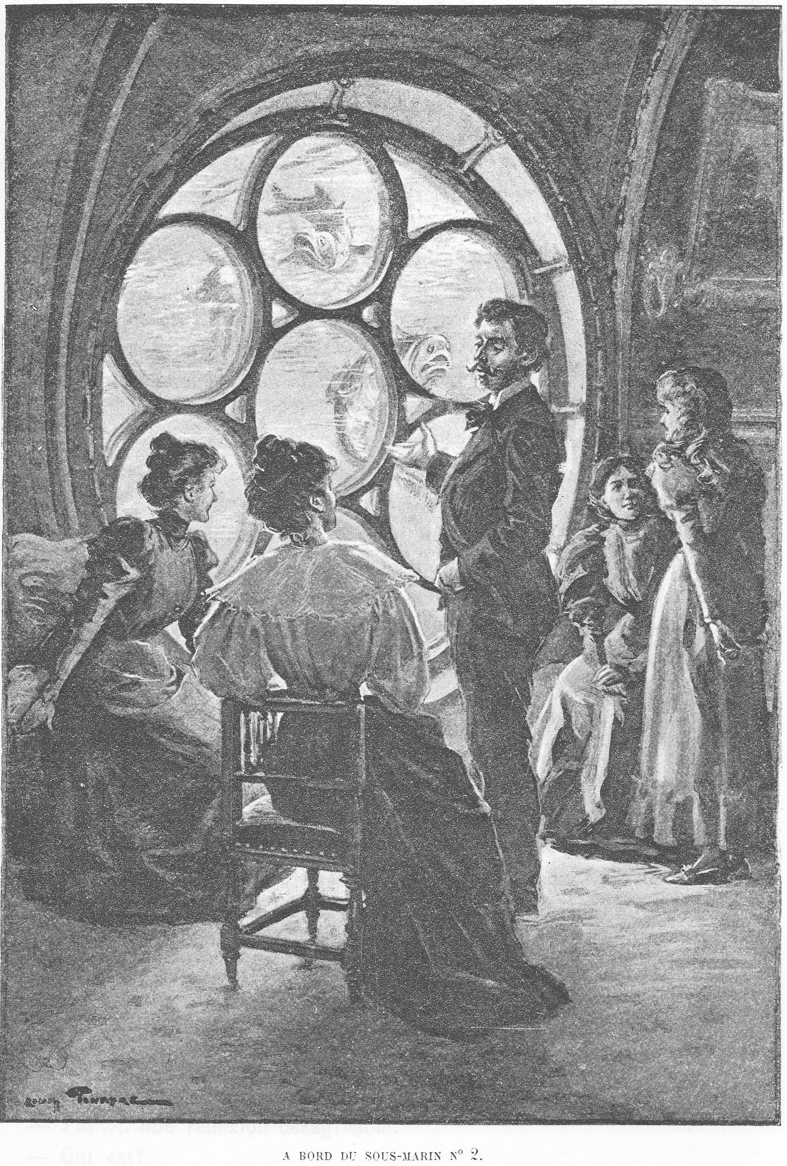 "A bord du sous-marin n°2", gravure d'un dessin de Louis Tinayre illustrant le roman de Paul d'Ivoi "Corsaire Triplex" (1898). Illustration figurant dans la seconde partie du roman, au chapitre 2.